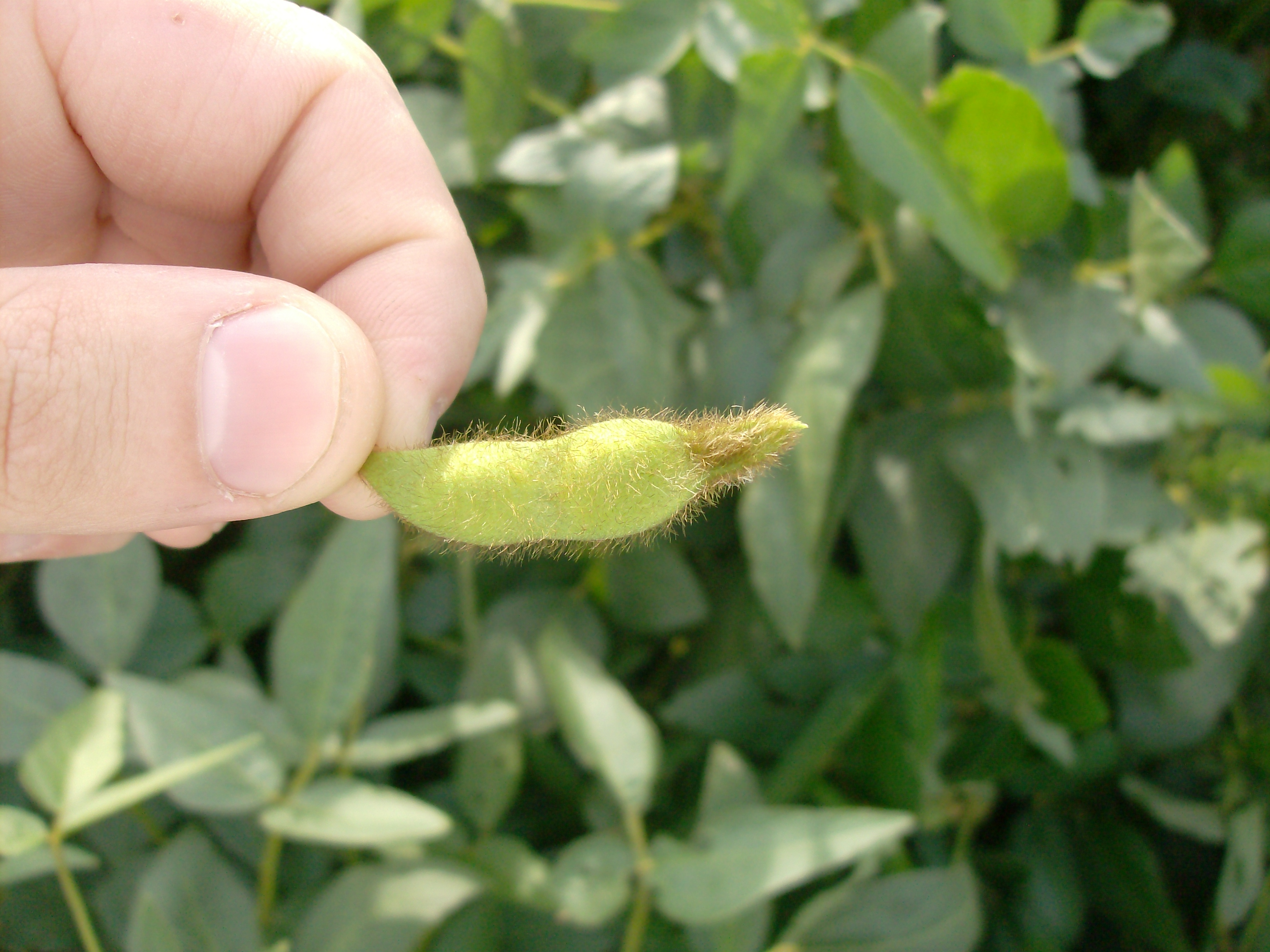 En la imagén se puede ver una vaina de soja la cual fue extraída de la planta en el estado R4 (Plena formación de Vainas). Dicha vaina poseía 3 granos que se estaban formando pero solamente creceran 2 granos debido a que el extremo de la vaina fue dañado por Chinches y dicho grano no se formara. Cultivo de Soja sembrado en Zarate, Argentina.